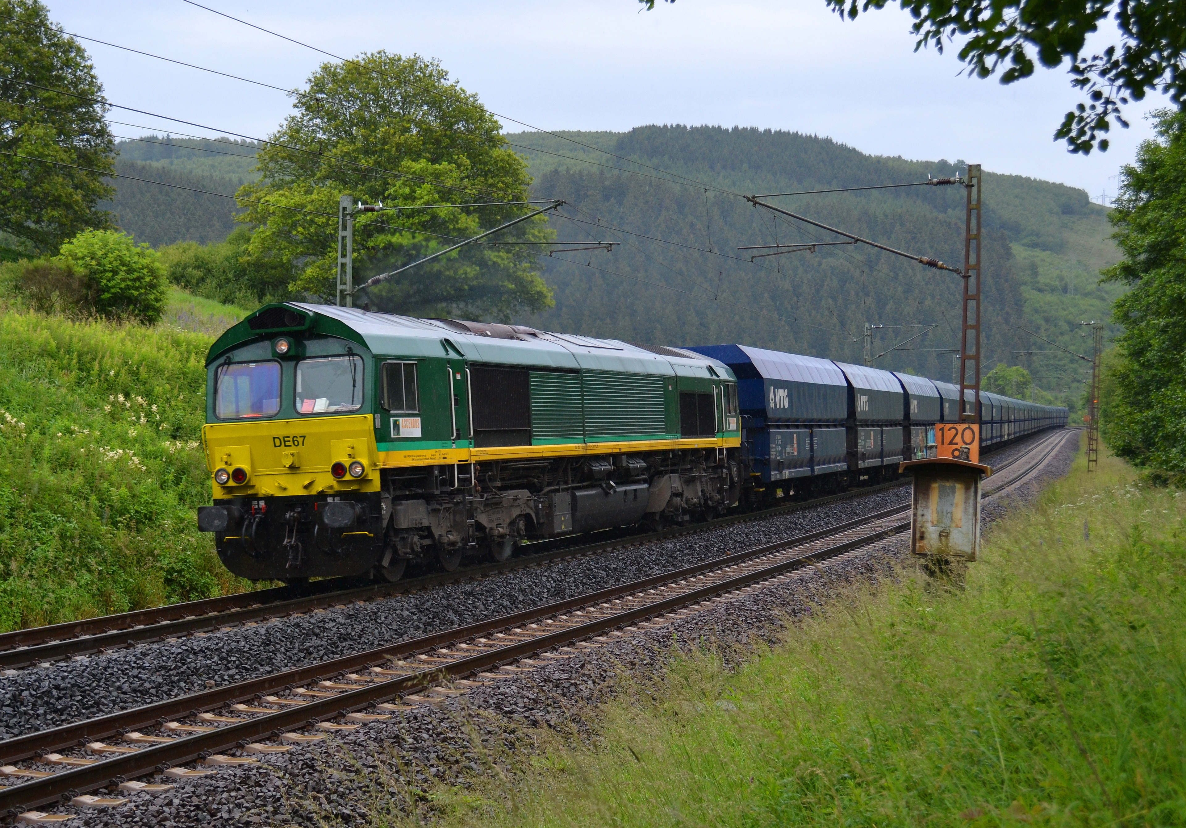 Am 24. Juni 2012 bespannte die DE 67 (Class 66) der HGK den planmäßig auf der Dillstrecke verkehrenden Zug DGS 88822 von Profen nach Köln.